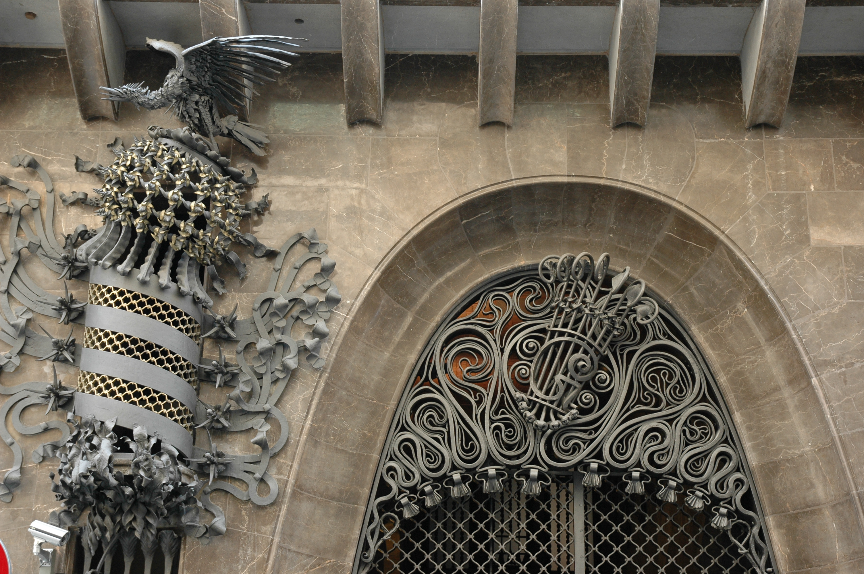 Barcelona - Palau Güell - Forjats entrada